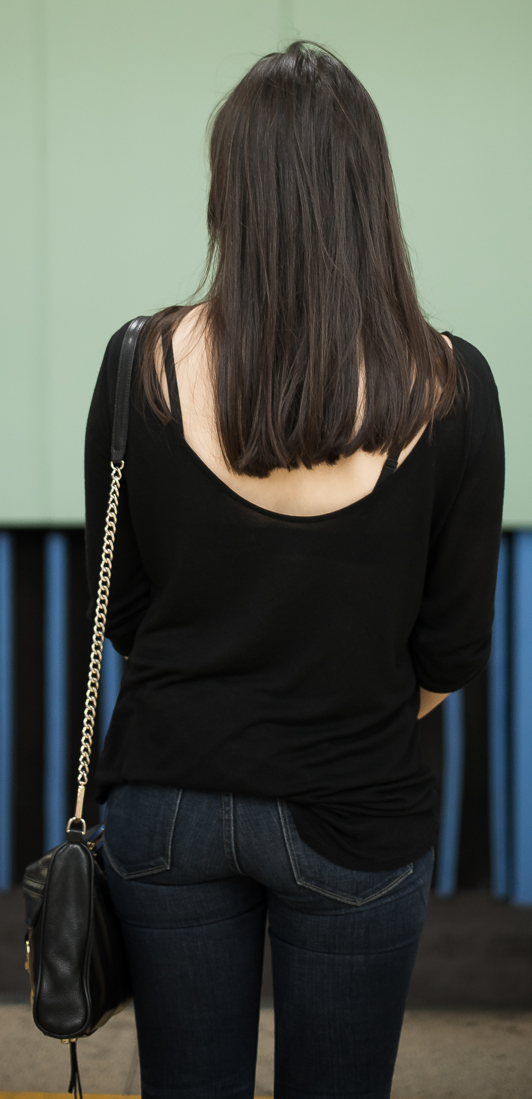 _DSC2862